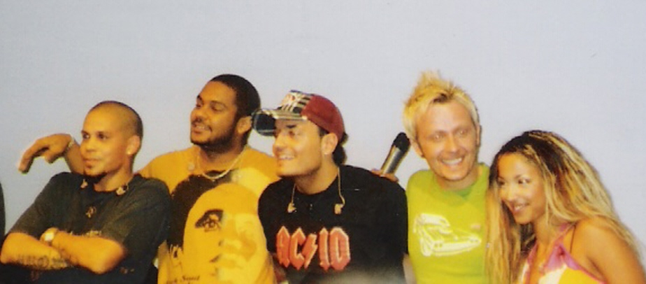 Bro´Sis in Hamburg (2004)